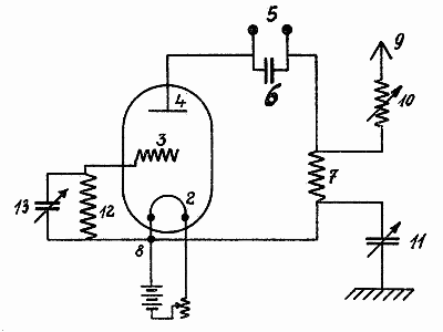 Huth-Kühn-Oszillator Patentschrift